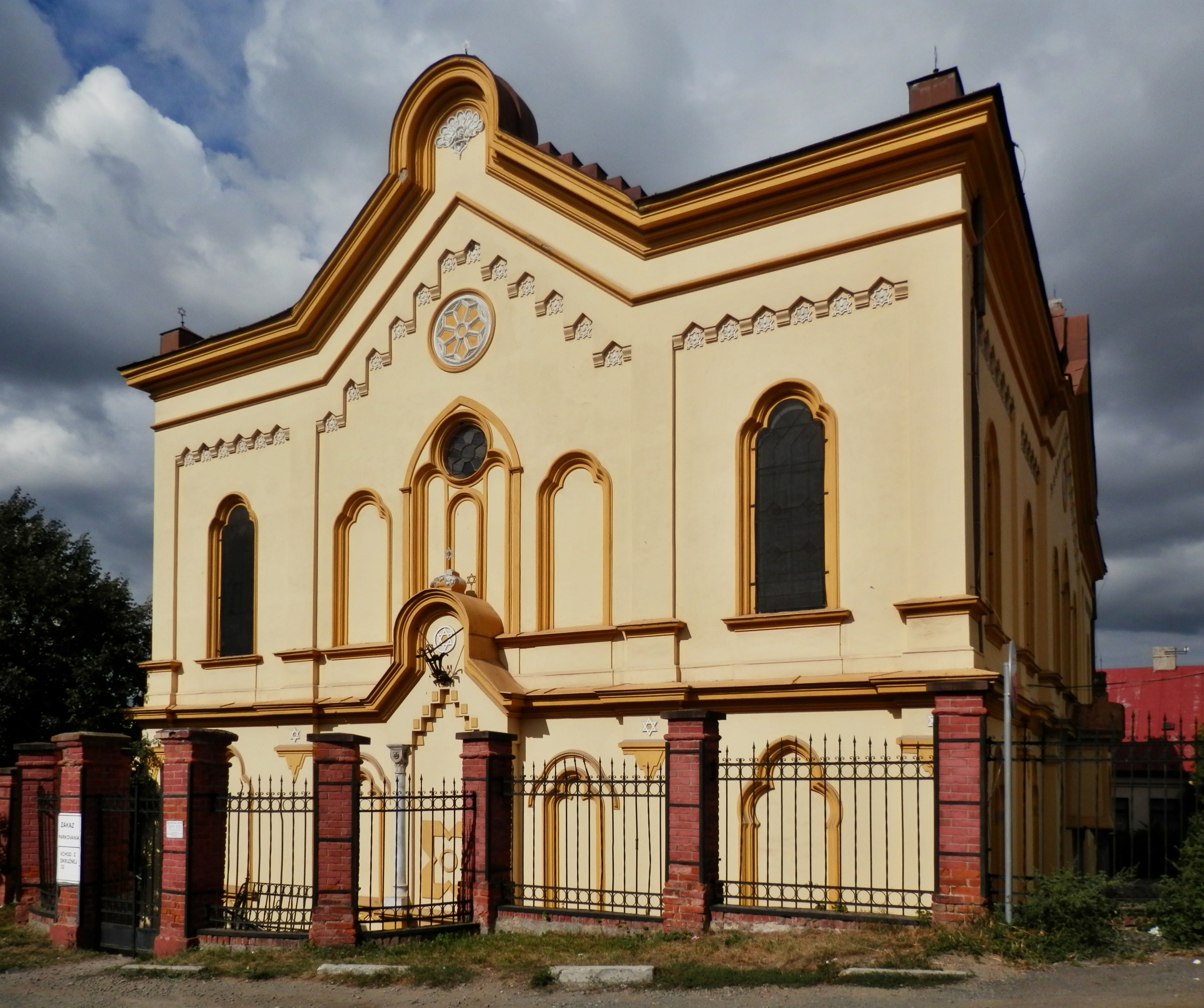 Židovská synagóga. Pohľad z Jarkovej ulice. Východná strana synagógy. Mesto Prešov.